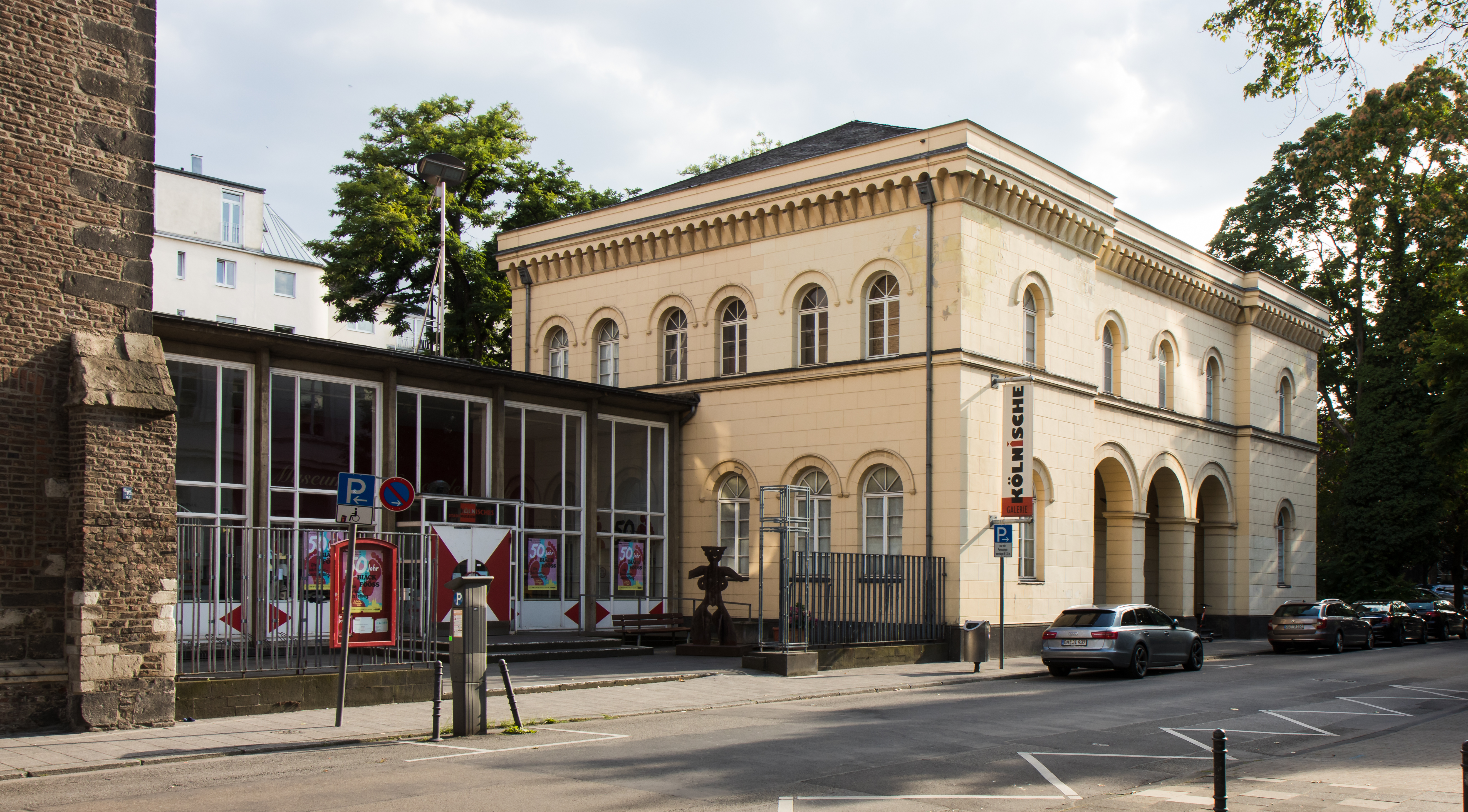 Kölnisches Stadtmuseum in Zeughaus und Alter Wache. Hier: Treppenturm mit „Goldener Vogel“ von HA Schult